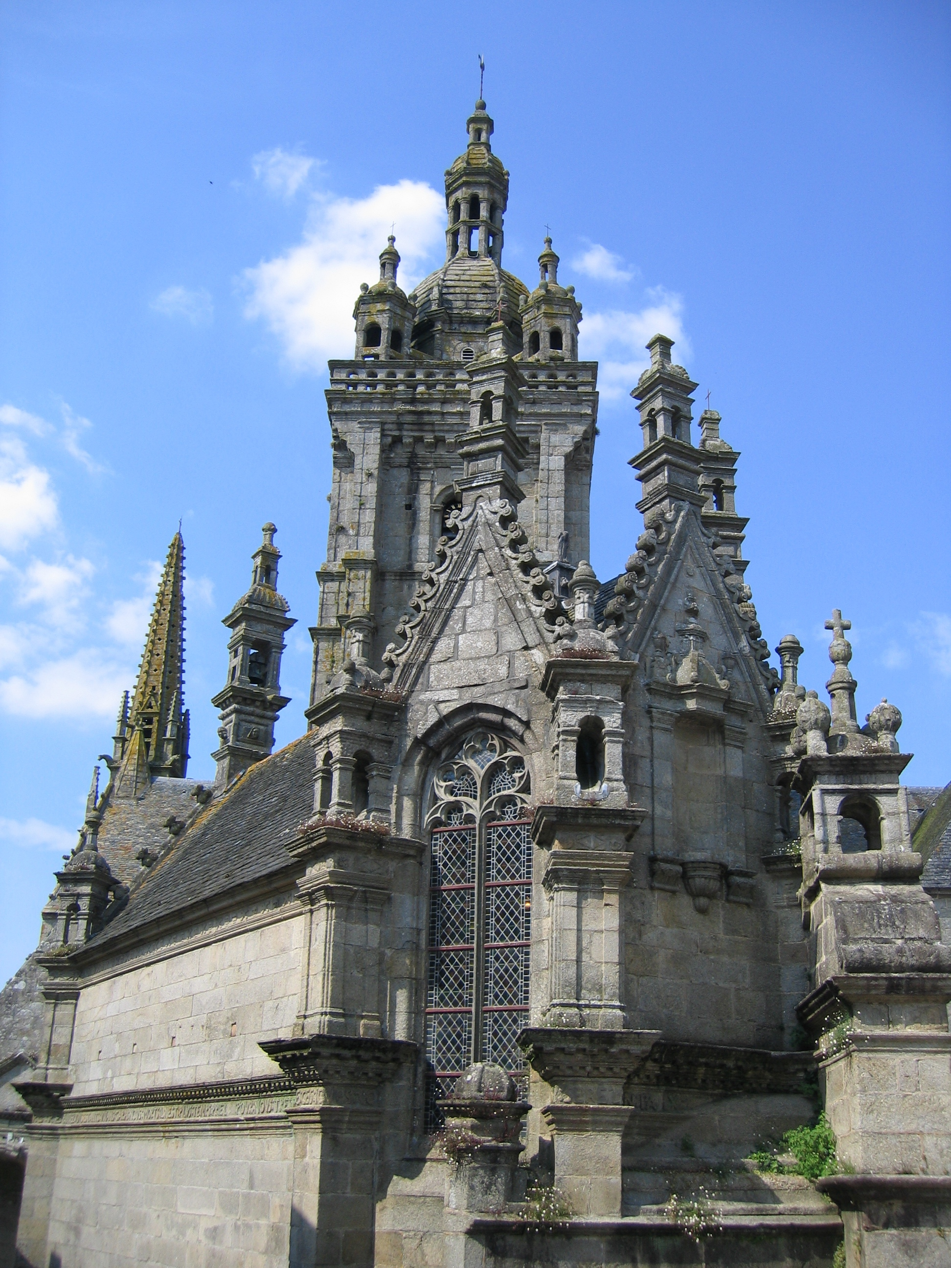 Enclos paroissial de Saint Thégonnec détail